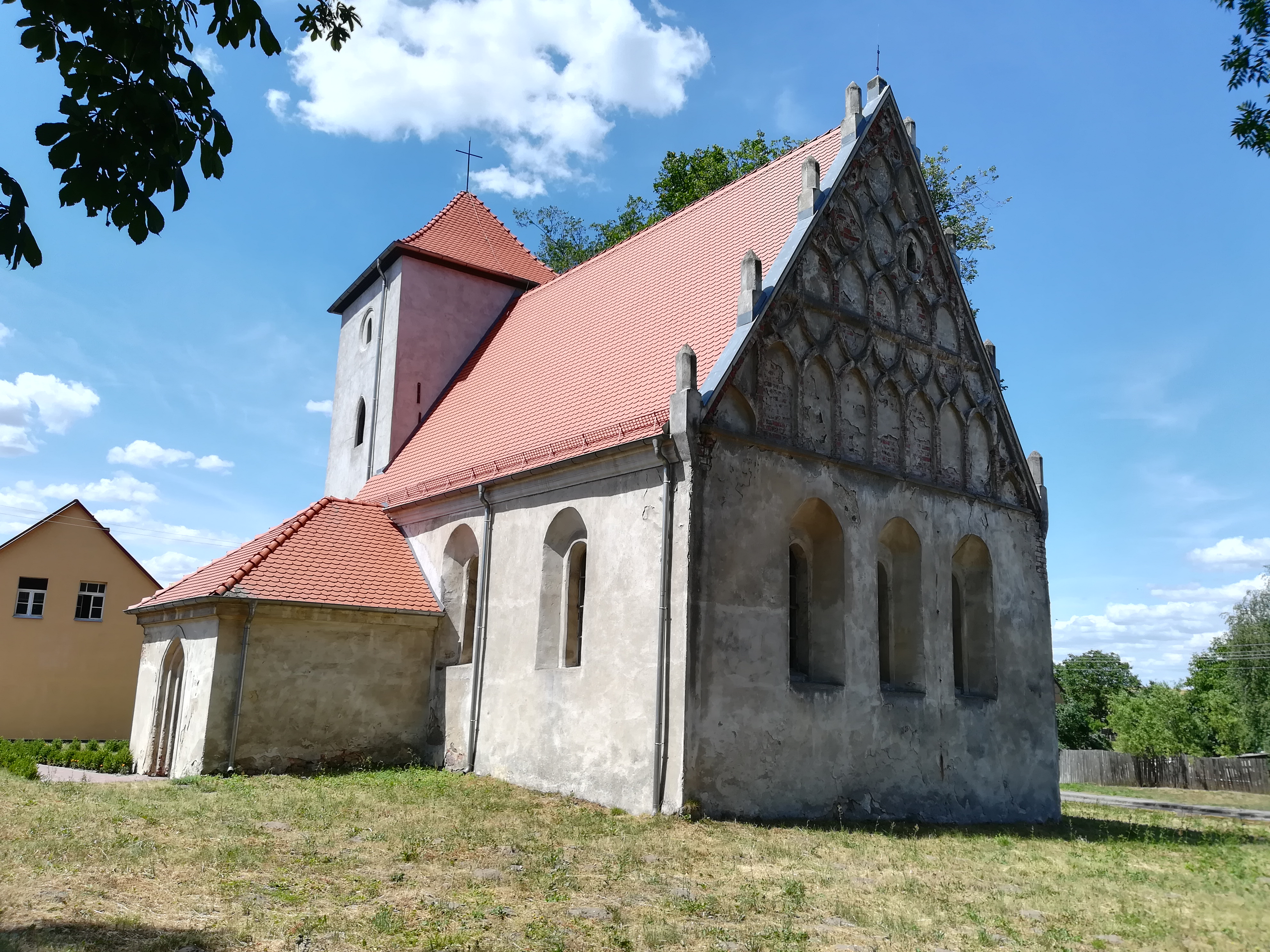 Kościół św. Piusa X w Gronowie koło Ośna Lub.